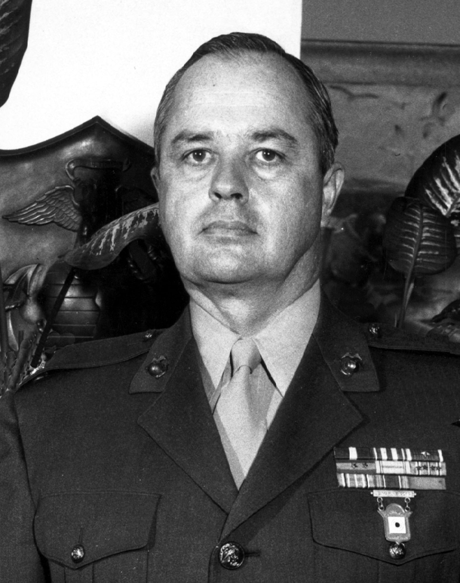 Brigadier General Walter Stauffer "Tabasco Mac" McIlhenny, USMCR